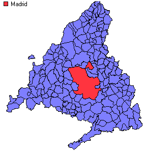 Mapa de los municipios de la Comunidad de Madrid.